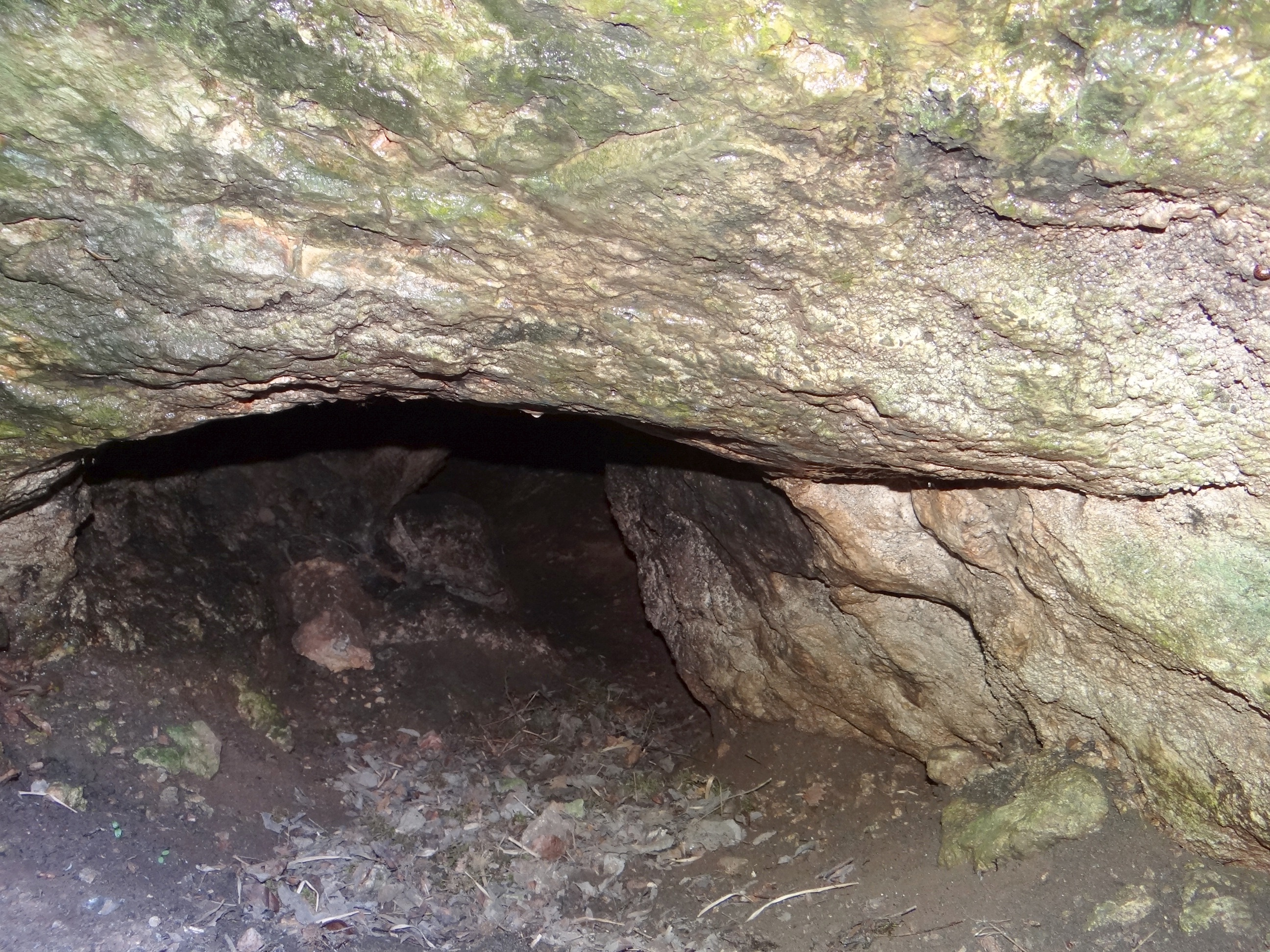 Jaskinia pod Agrestem w Żytnich Skałach we wsi Bębło